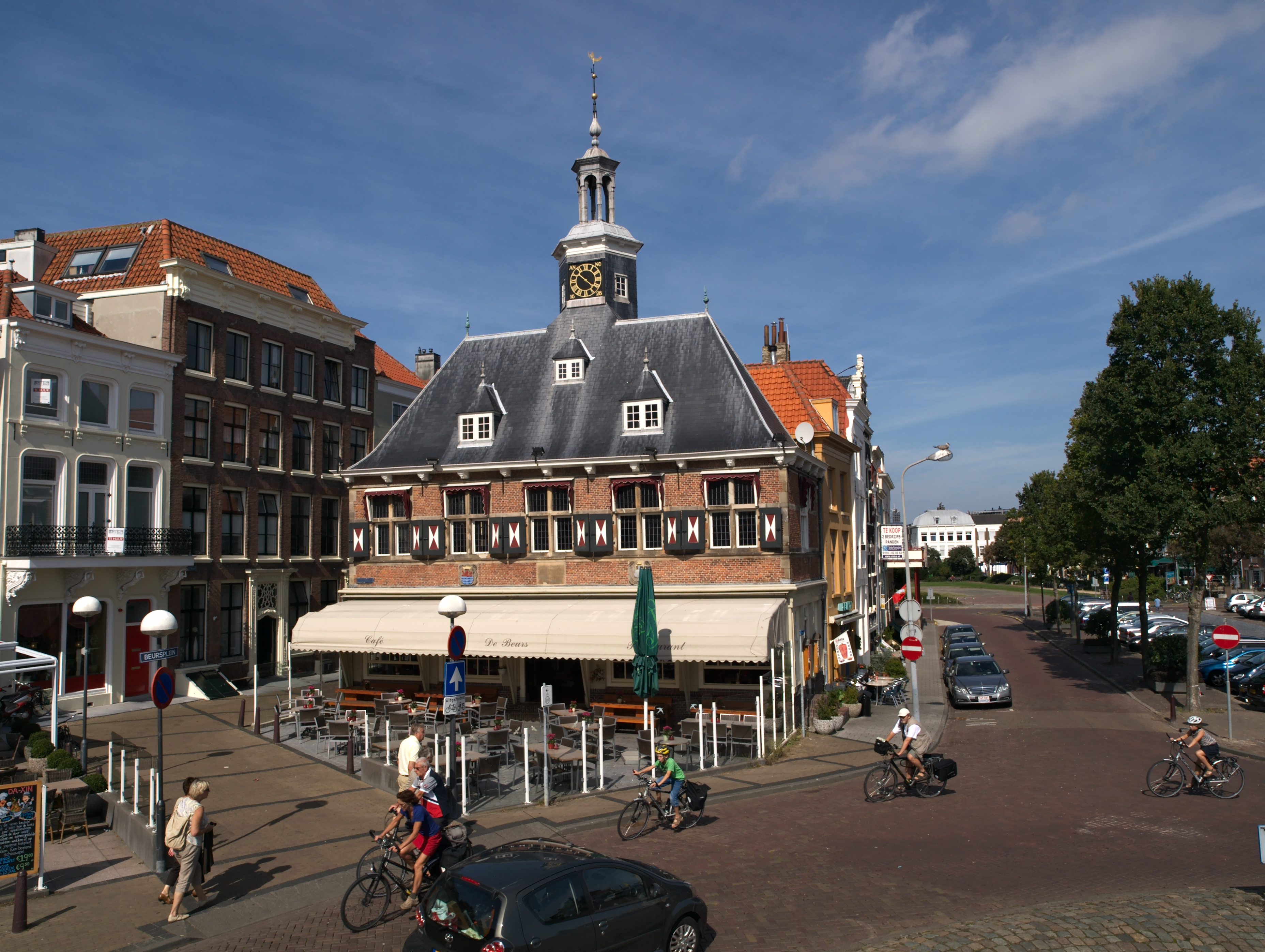 Rijksmonumenten Het beursgebouw aan Beursplein 11 te Vlissingen tijdens Open Monumentendag 2010.